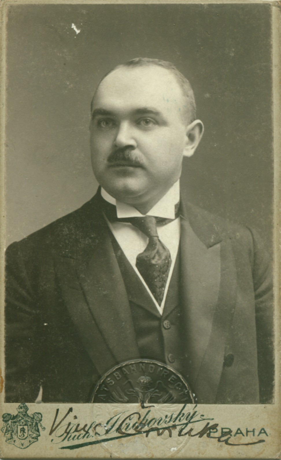 Vincenc Červinka